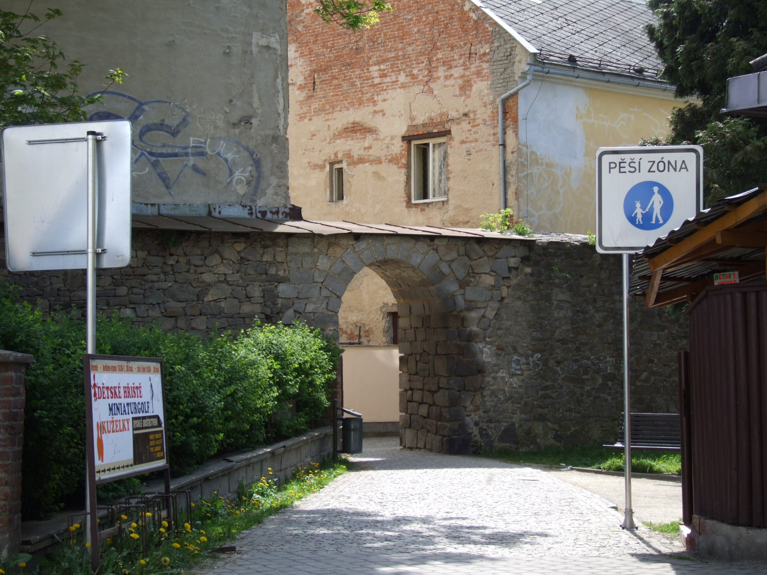 Šumperk (Mährisch Schönberg) - city wall